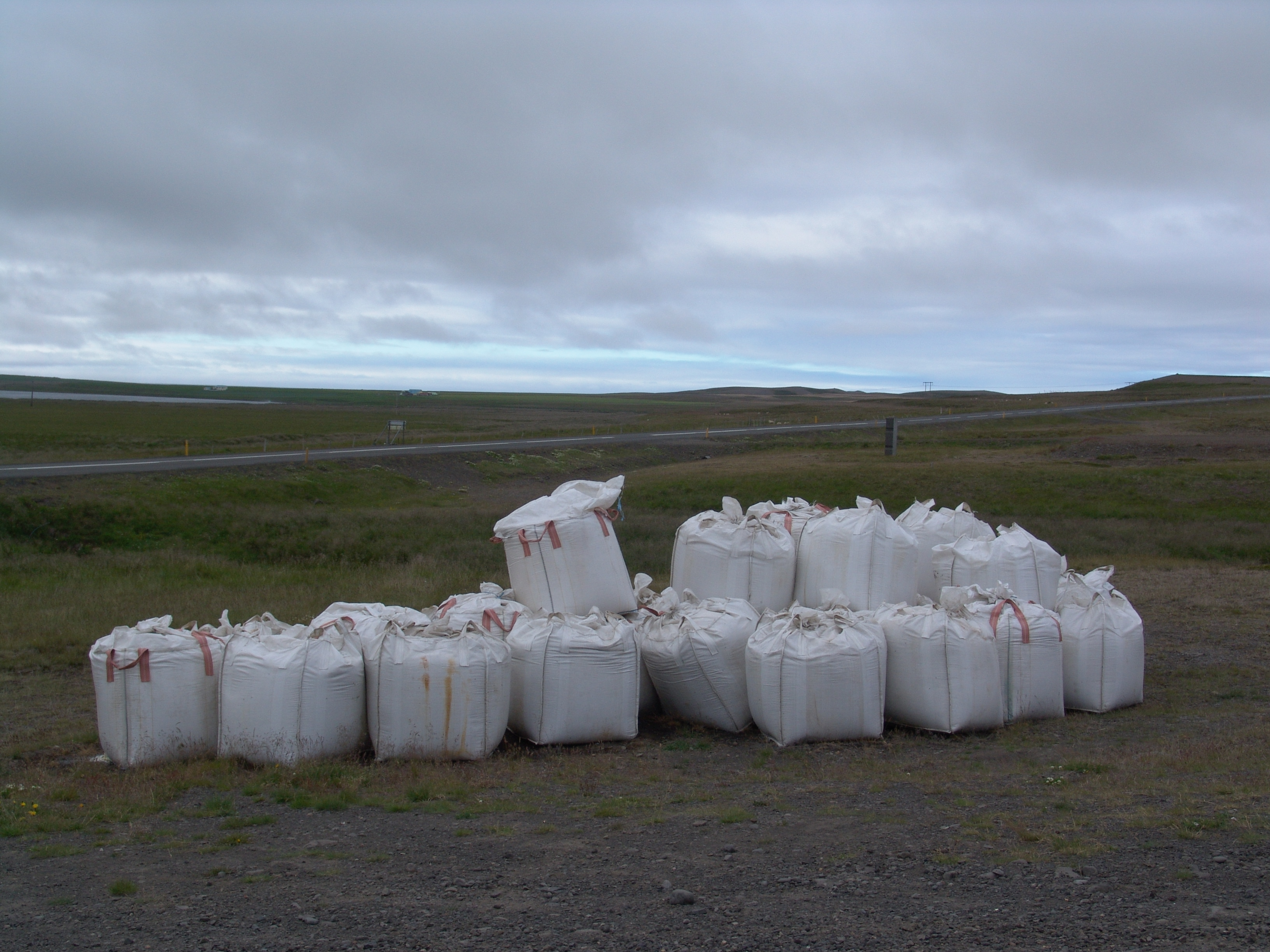 Island, Landschaft, Dünger in Säcken auf einer Wiese.